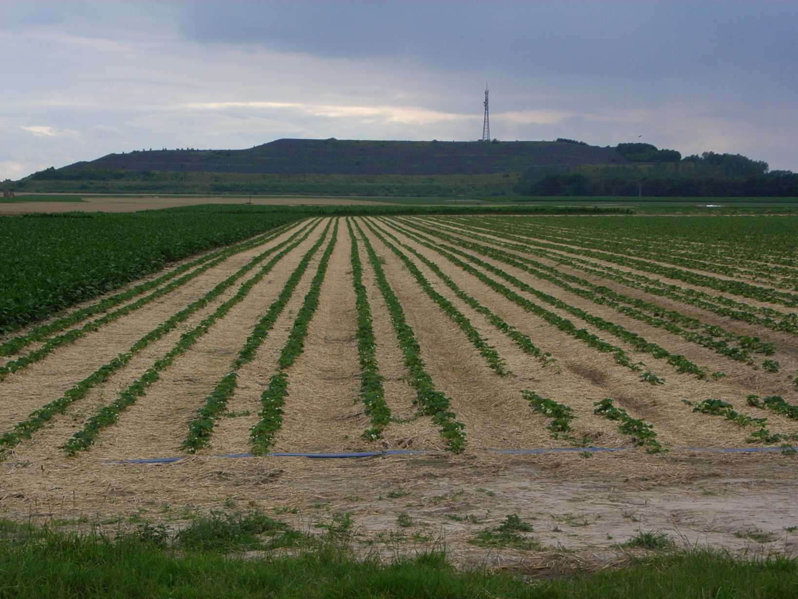 Ratheimer Halde der Zeche Sophia-Jacoba, Hückelhoven, NRW